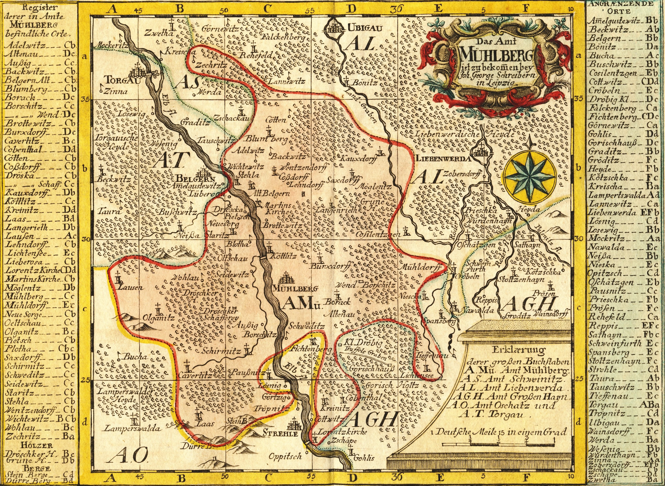 Amt Mühlberg